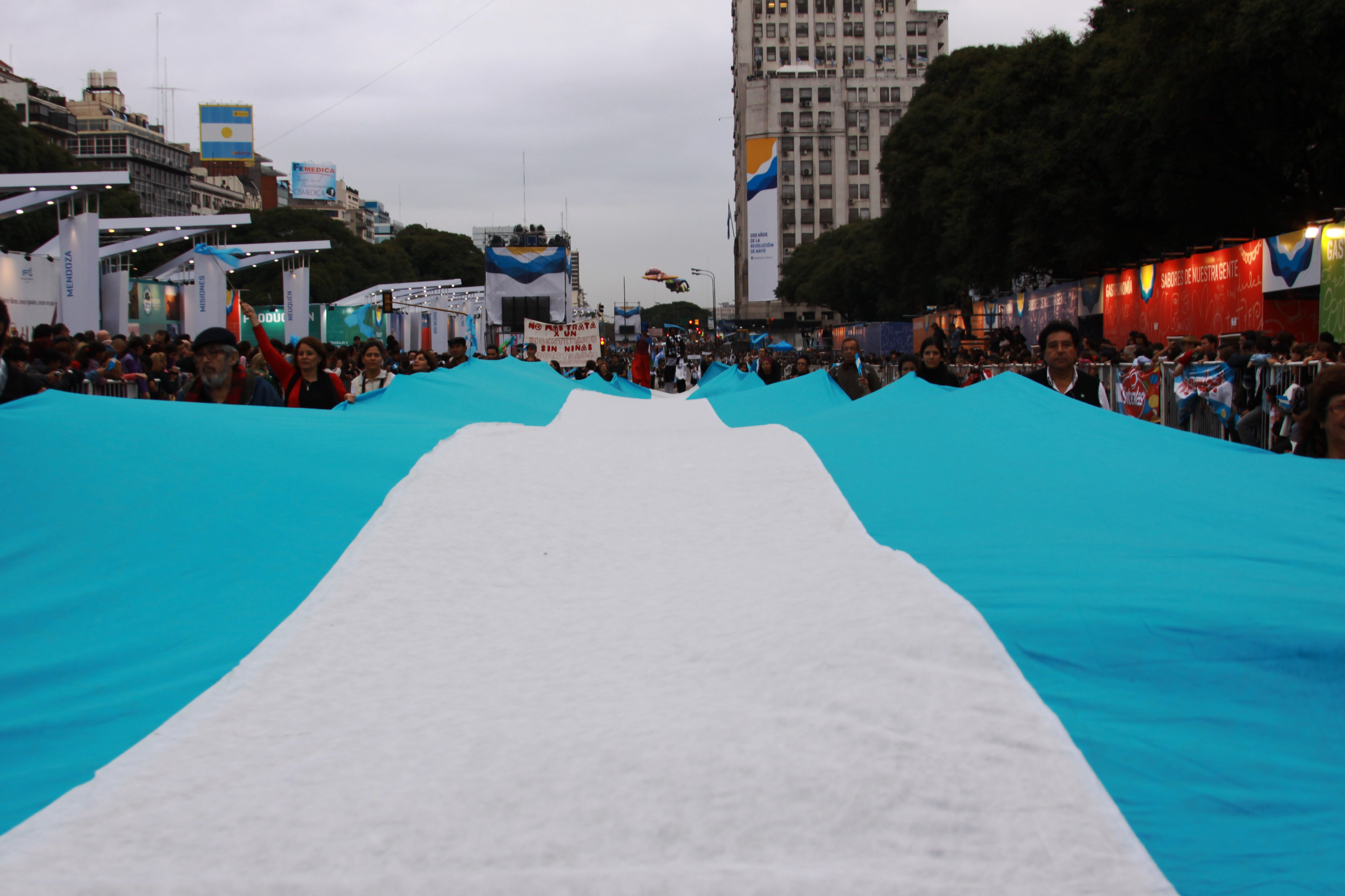 Bandera argentina en la avenida 9 de Julio durante los festejos del bicentenario.